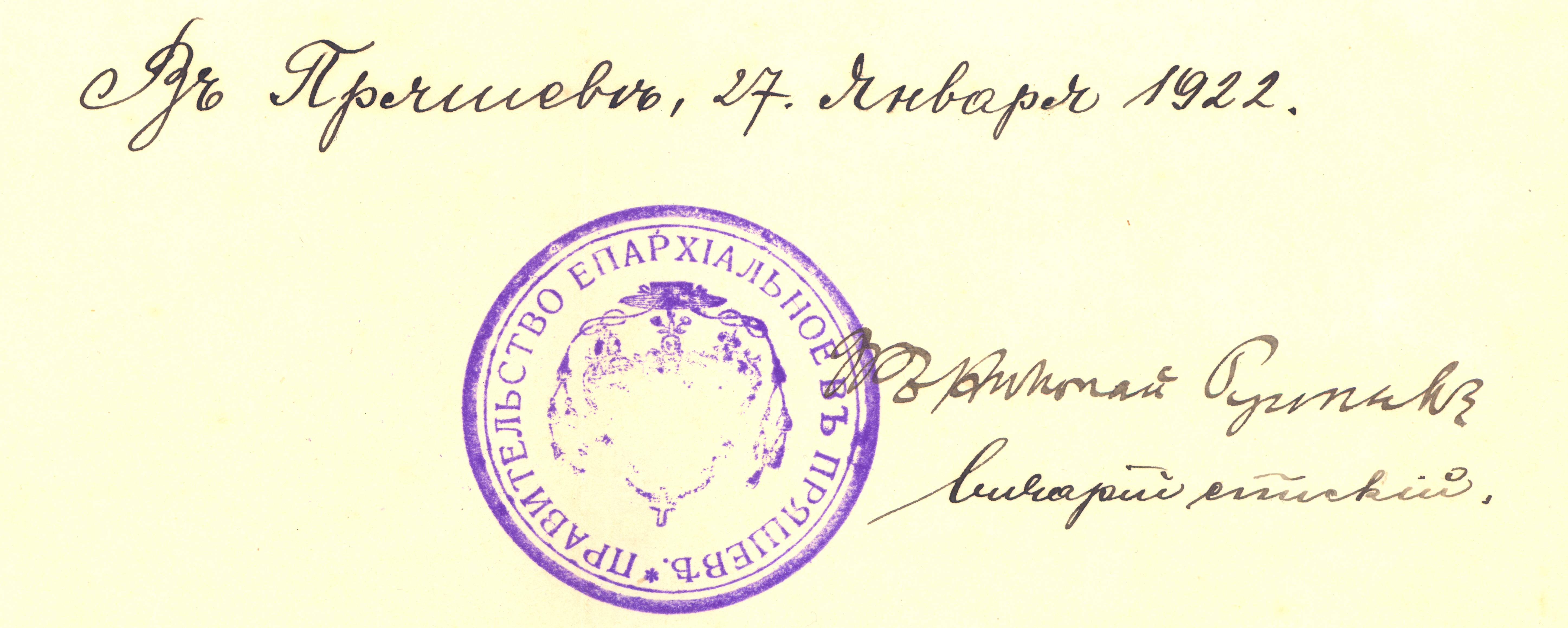 Podpis a pečiatka Generálneho biskupského vikára Mikuláša Russnáka z roku 1922